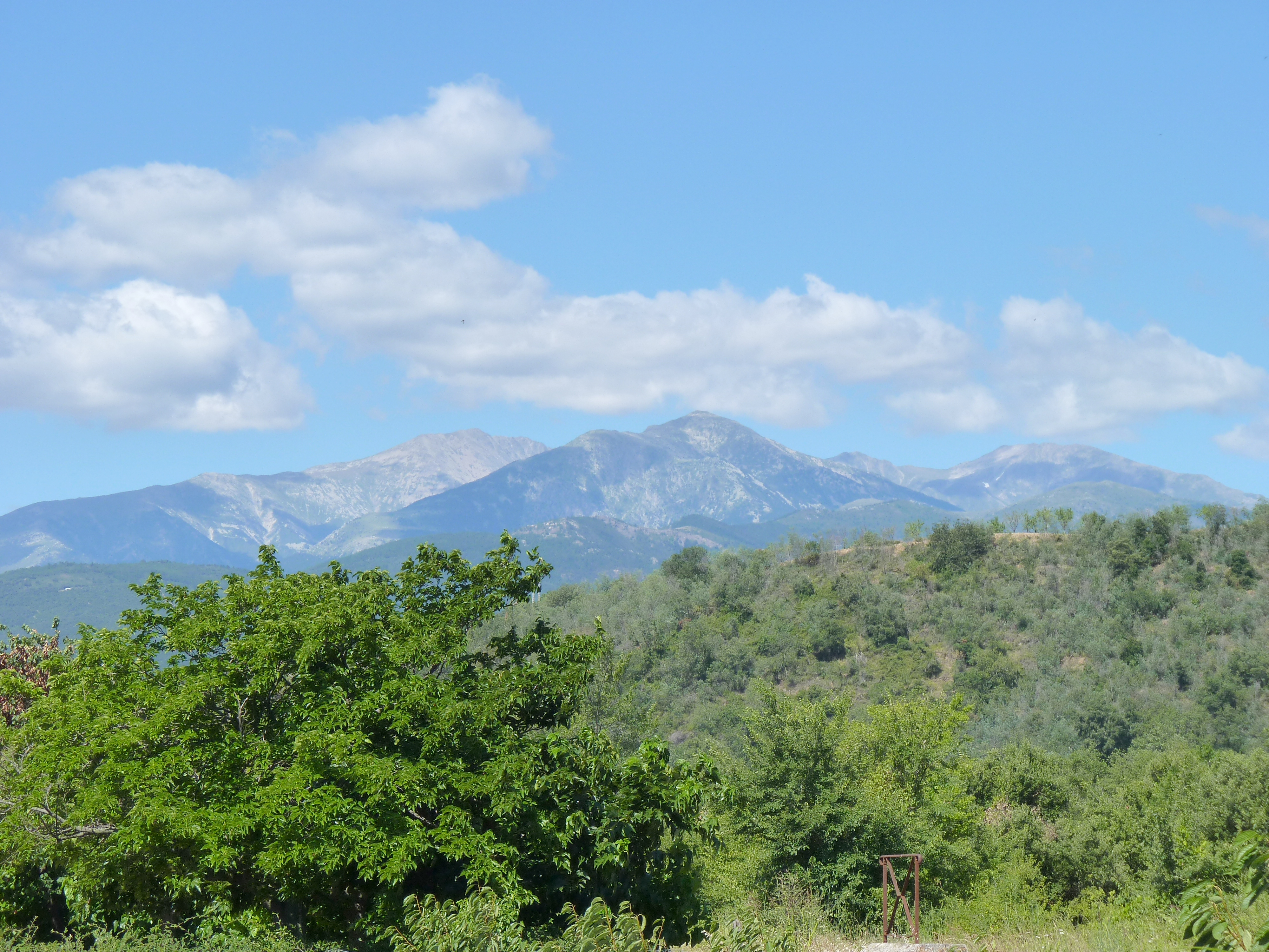 Vue du massif du Canigou depuis Céret (Pyrénées-Orientales, Languedoc-Roussillon, France)